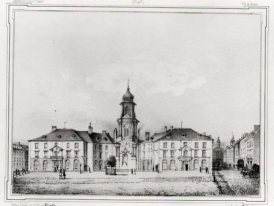 L'actuel hôtel de ville de Rennes, ancien présidial. La bibliothèque se trouvait dans l'aile nord (à droite). En arrière plan, à droite, on distingue la façade de l'église Saint-Sauveur.